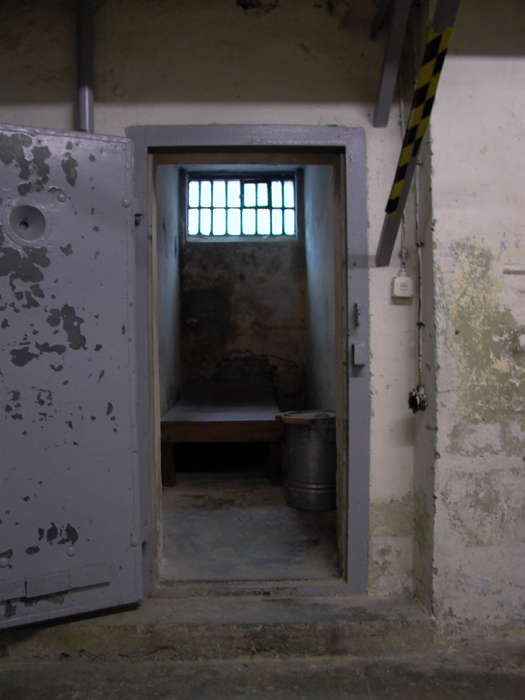 Gedenkstätte Hohenschönhausen, Zelle im Stasi Gefängnis in Berlin Hohenschönhausen (Bild: Daniel van der Ree, Niederlande)